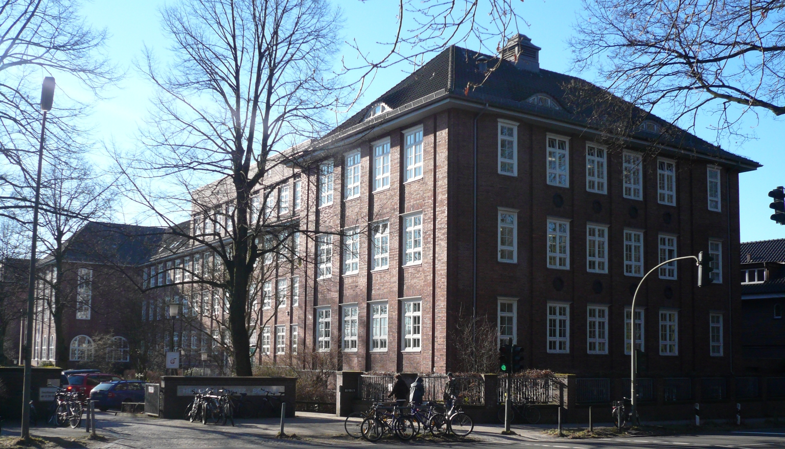 Heinrich Hertz Schule, Hamburg, Grasweg - Architekt: Fritz Schumacher This is a photograph of an architectural monument.